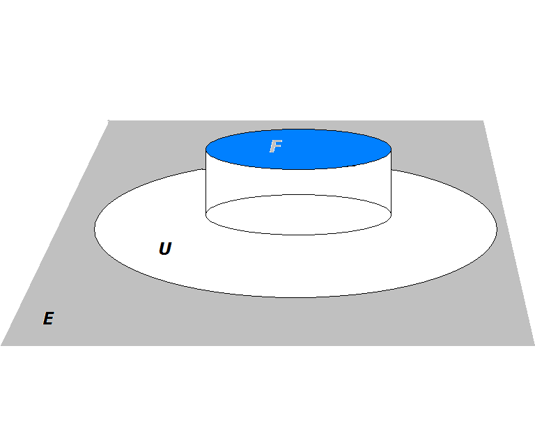 Urysohn's lemma [1]